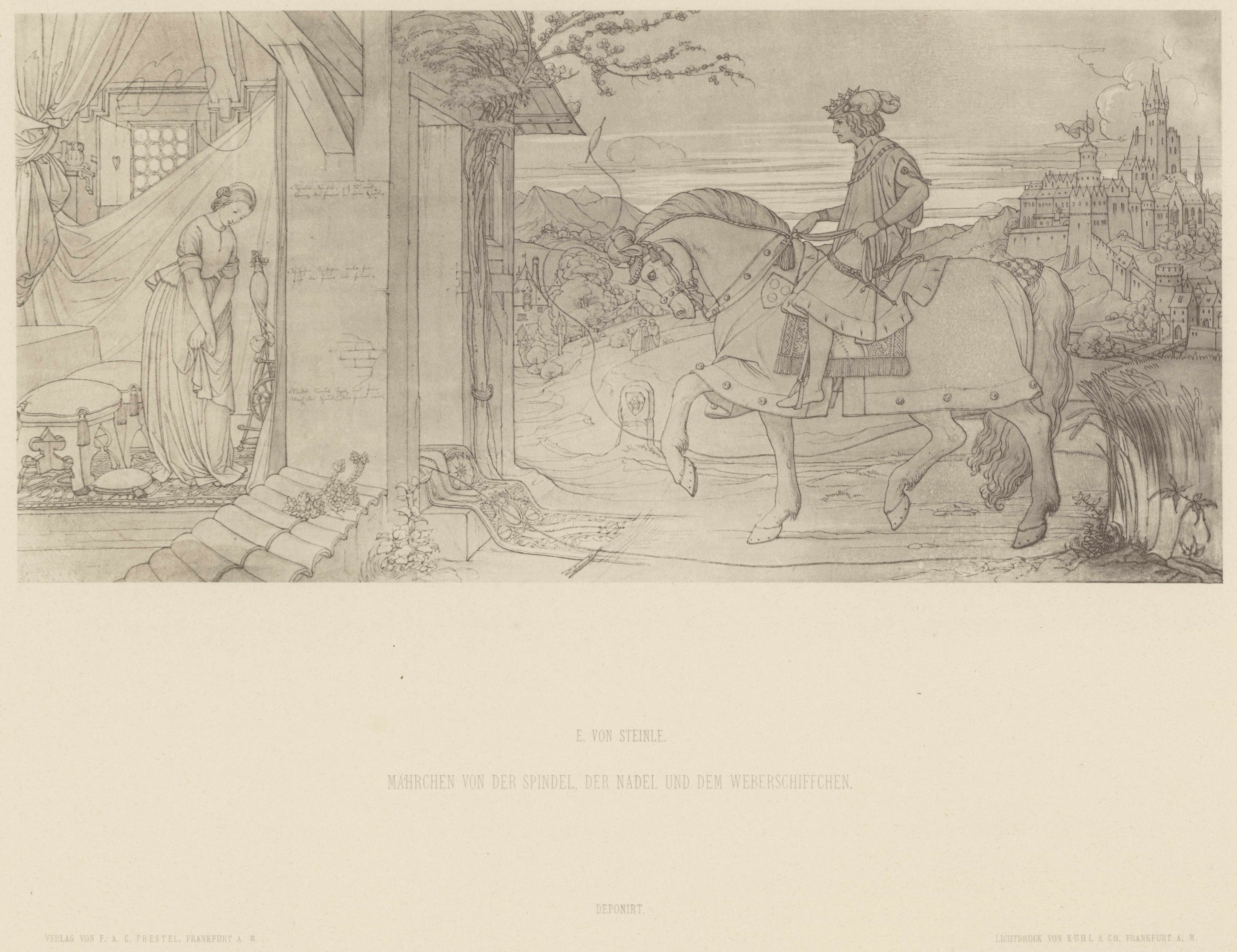 Mährchen von der Spindel, der Nadel und dem Weberschiffchen